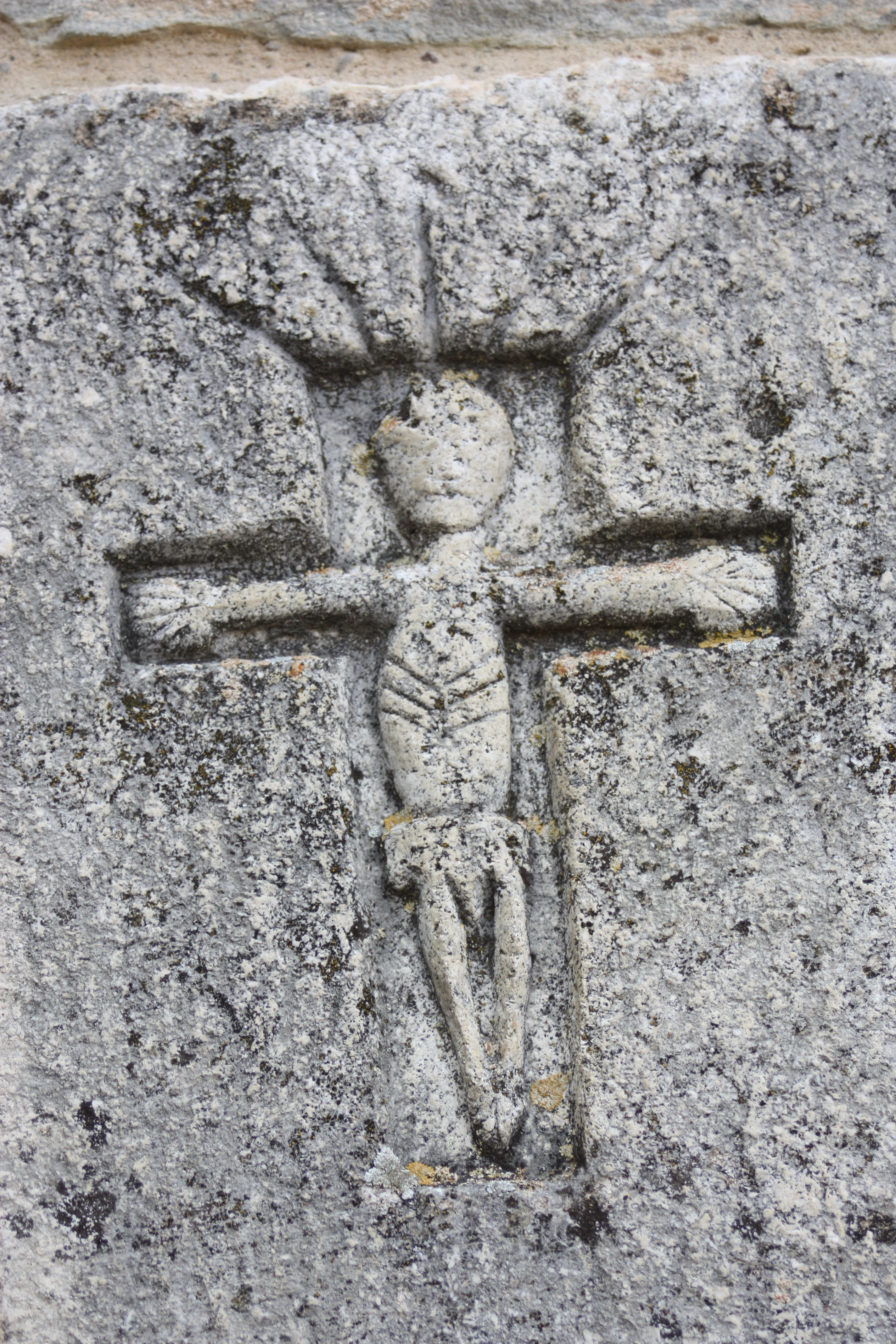 Detalle de cruz y grabado realizado en la clave del arco de la puerta principal